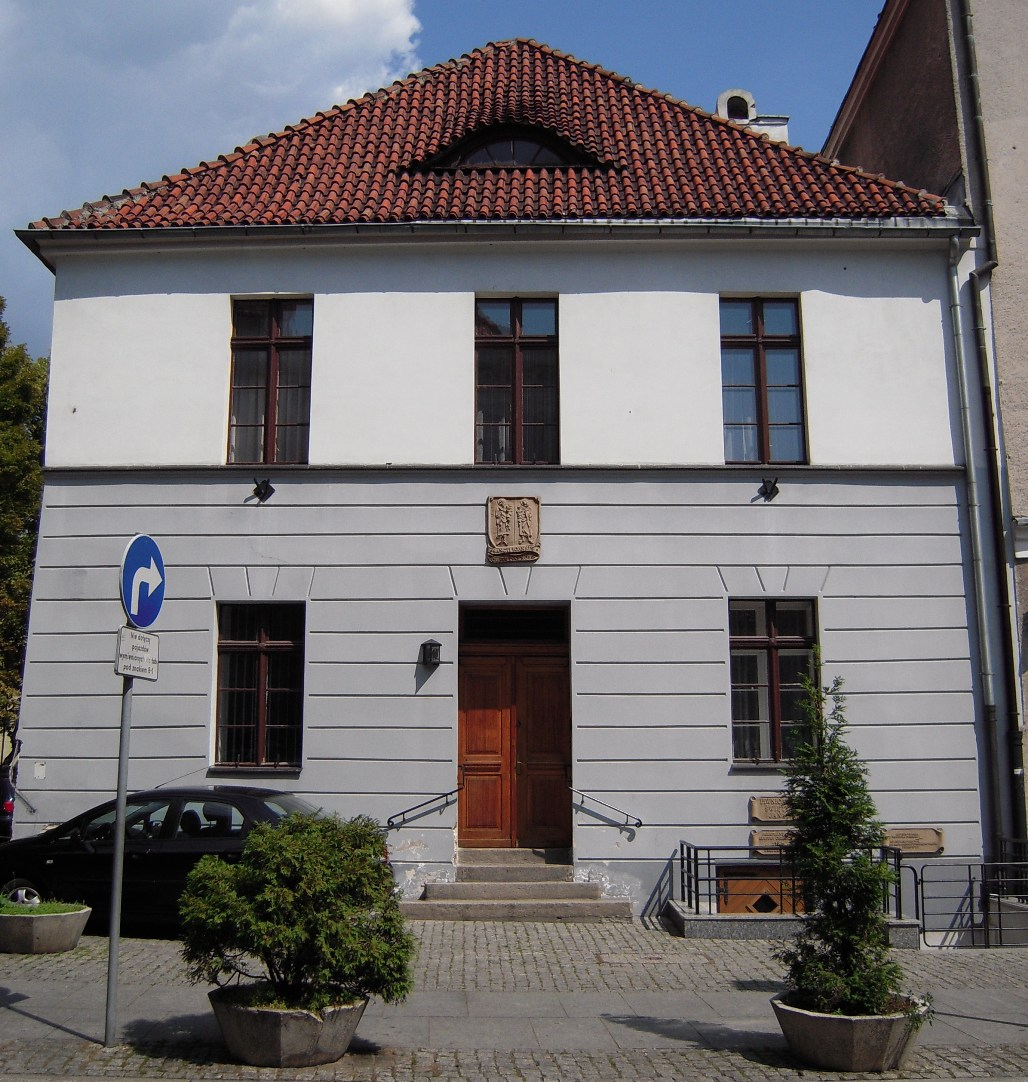 Toruń, ul. Żeglarska 16 - kamienica, pocz. XV, 2 poł. XIX w. (zabytek nr A/518)